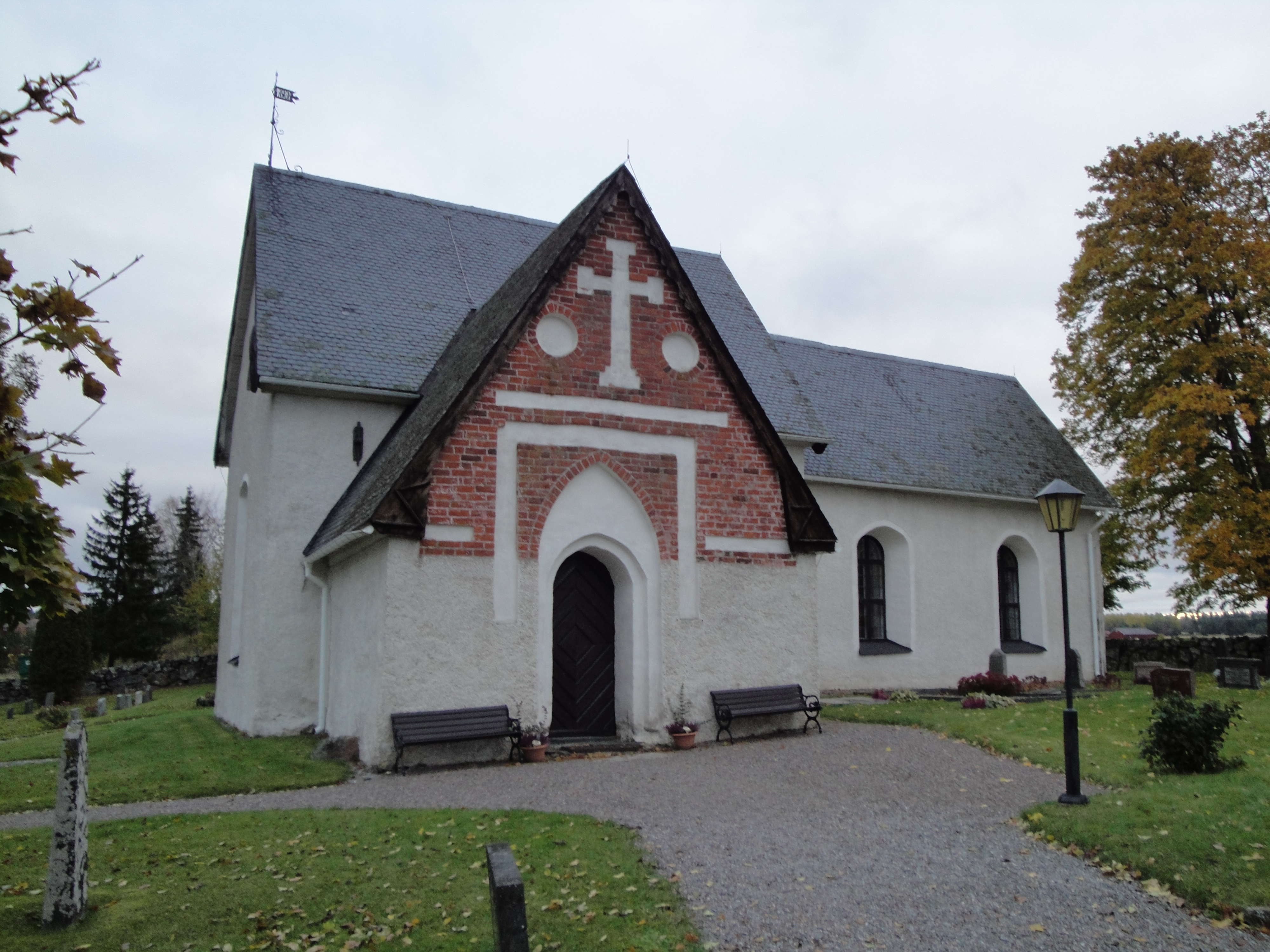 Vidbo kyrka, Uppsala stift, Sigtuna kommun.